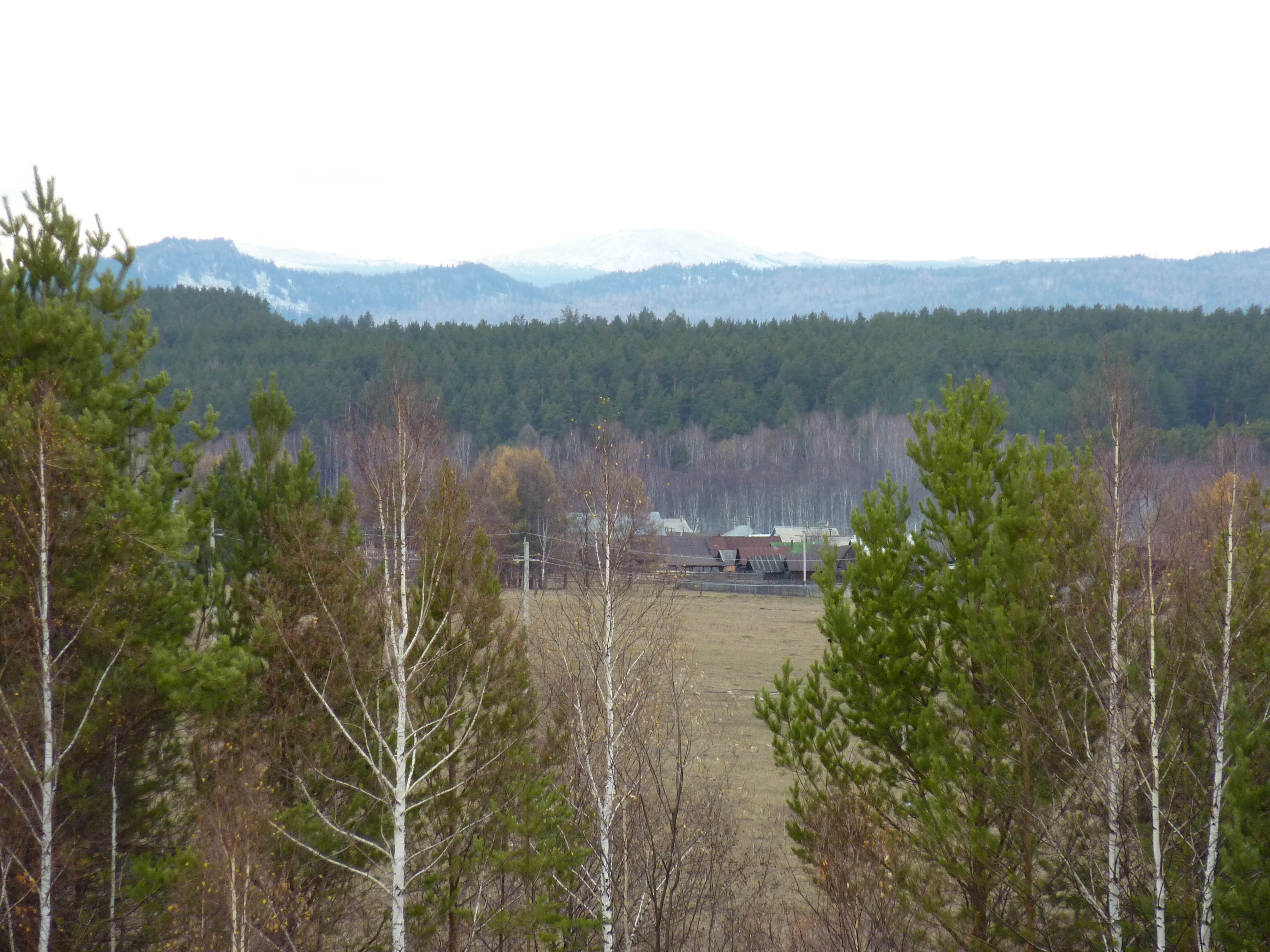 Village Nikolaevka (Beloretsky District, Bashkortostan)